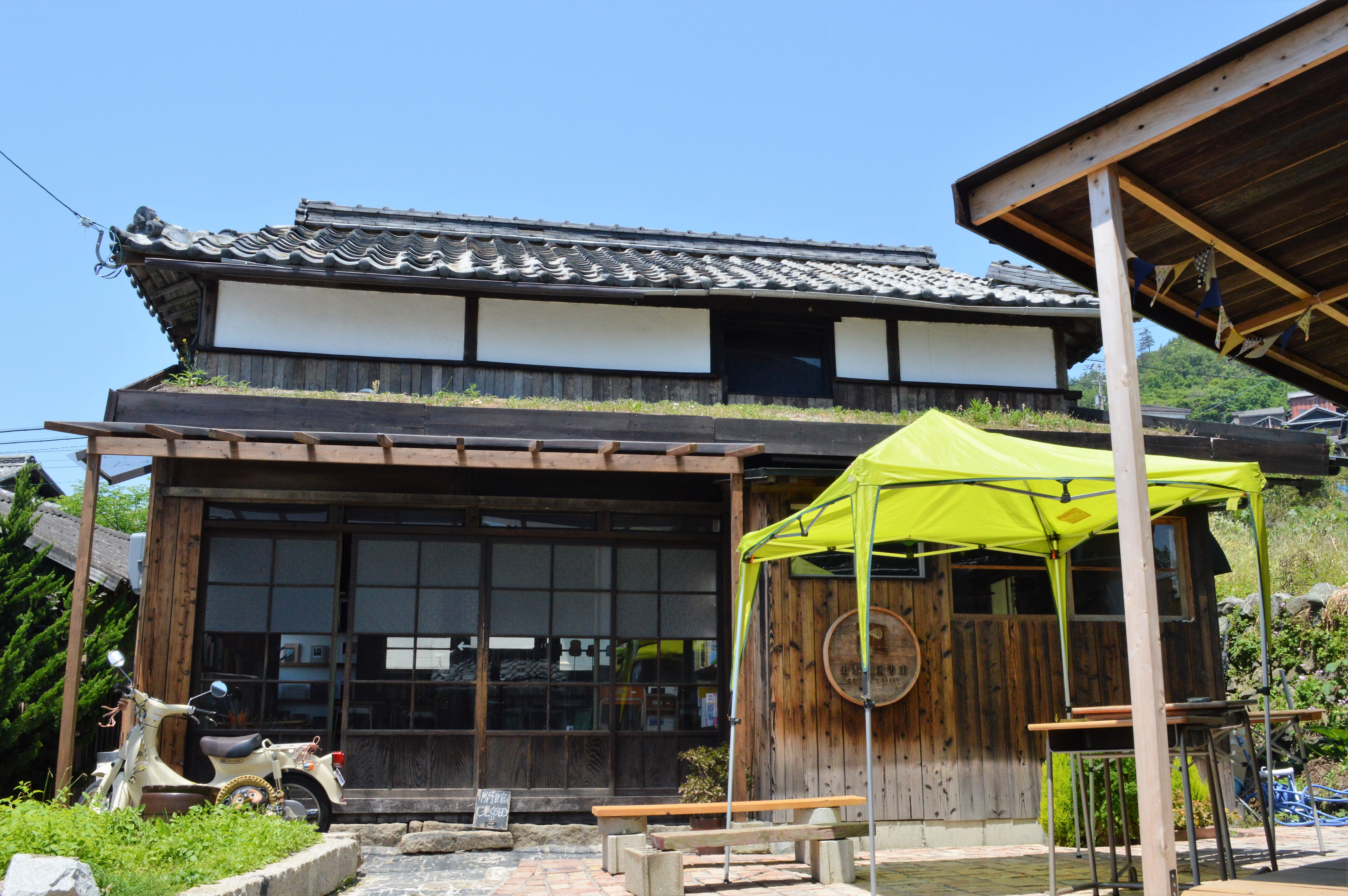 香川県高松市の男木島にある男木島図書館。